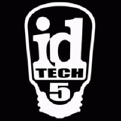 Logo der Spiel-Engine id Tech 5